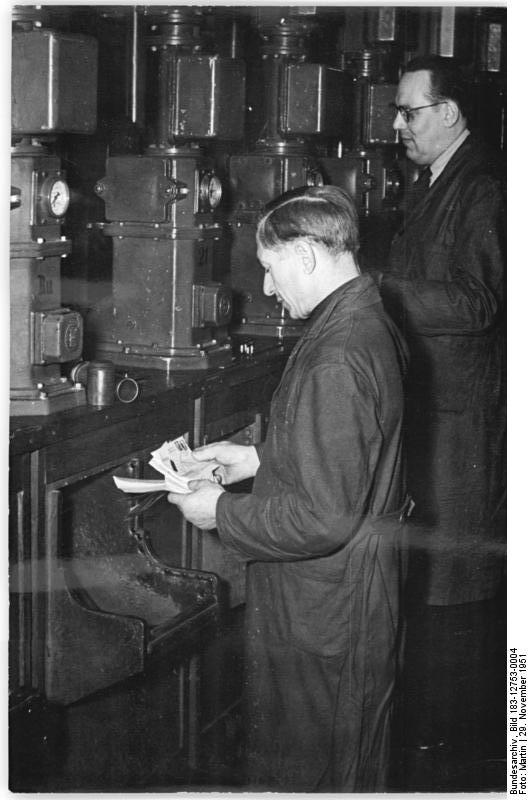 Illus Martin 29.11.51 75 Jahre Rohrpost in Berlin Am 1. Dezember 1951 besteht die Berliner Rohrpost 75 Jahre. Die Zentrale der Berliner Rohrpost und zugleich modernste Schnellrohrpostanlage Europas ist das Haupttelegrafenamt in der Oranienburger Strasse. Hier trifft die Post von den jeweiligen Postämtern ein und wird zu den jeweiligen Bestimmungsämtern weiterbefördert. UBz: Die Maschinenstation des HTA. Hier treffen die Büchsen mit der Rohrpost von den einzelnen Ämtern ein und werden zu den jeweiligen Bestimmungsämtern weiterbefördert.